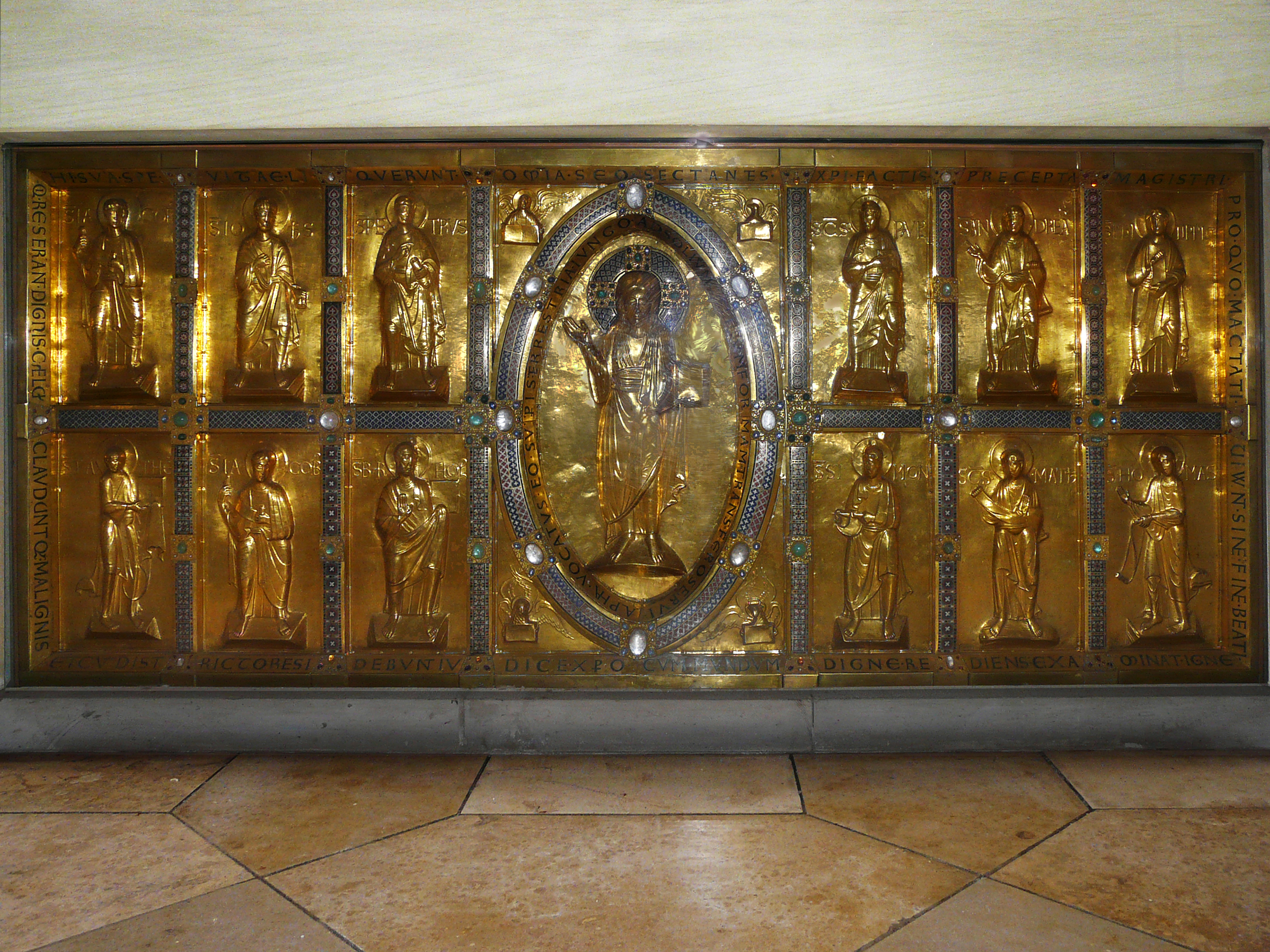 Алтарь